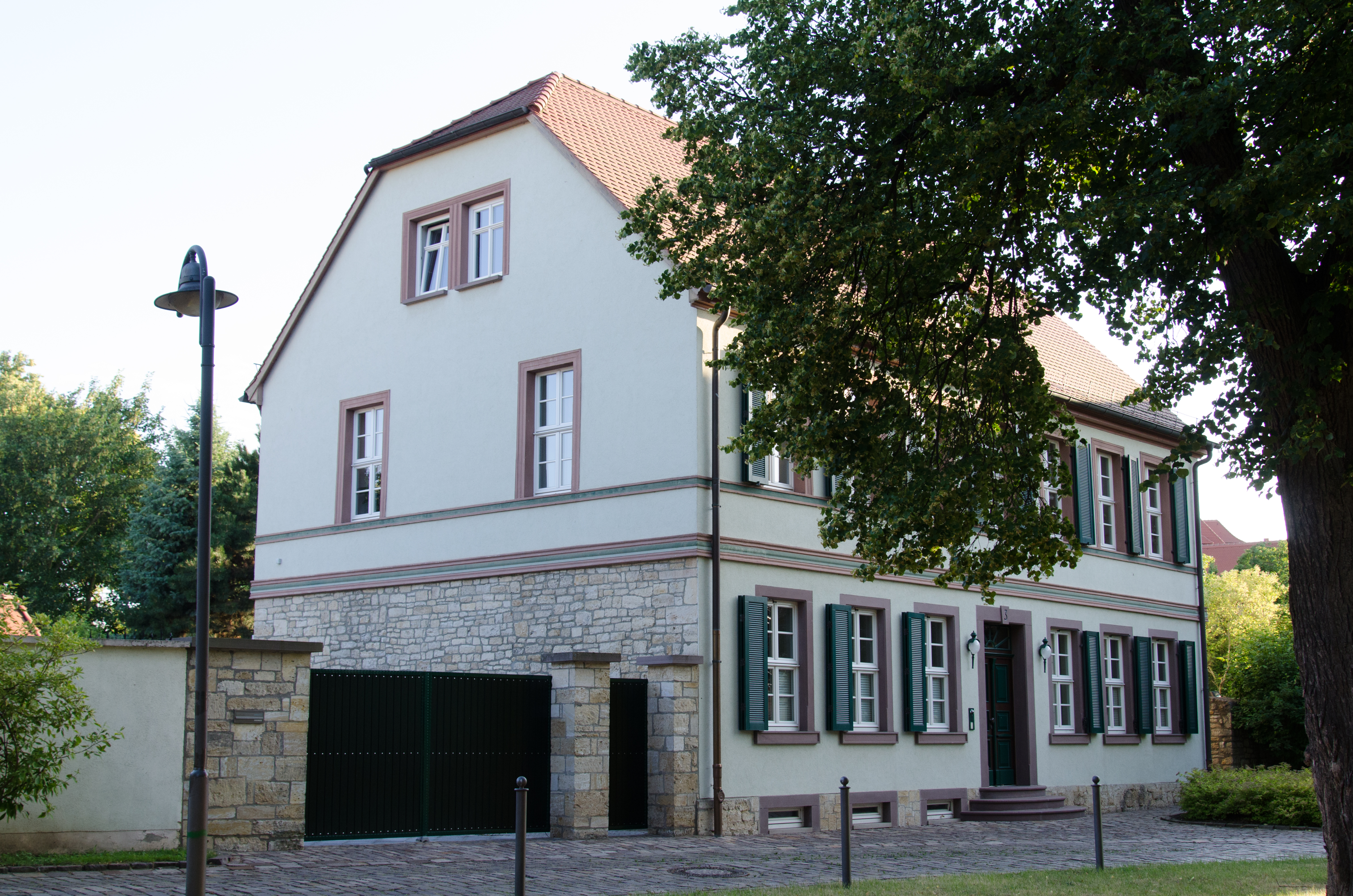 Querfurt, Kirchplan 3